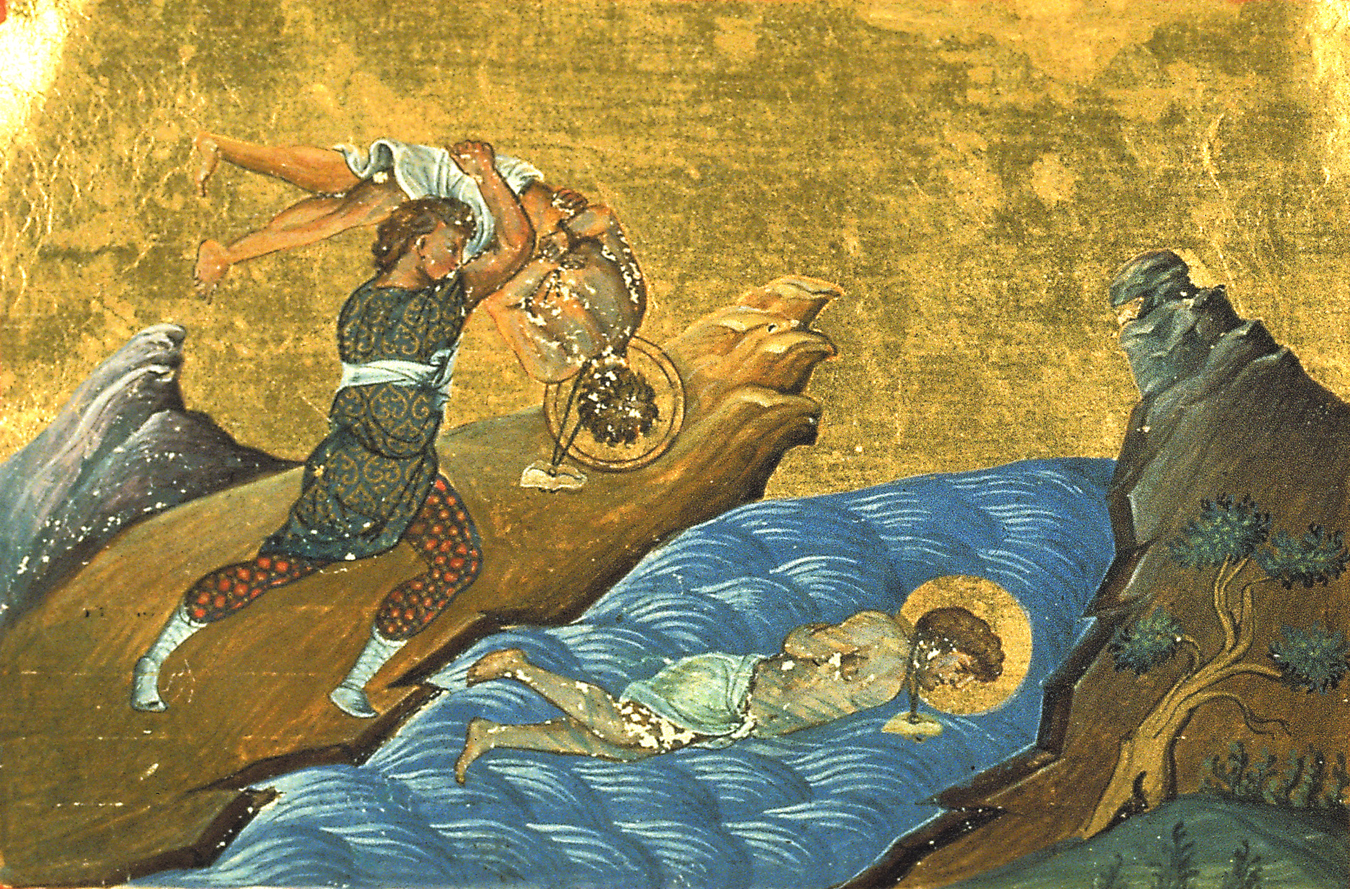 Мученики Ермил и Стратоник Константинополь. 985 г. Миниатюра Минология Василия II. Ватиканская библиотека. Рим.